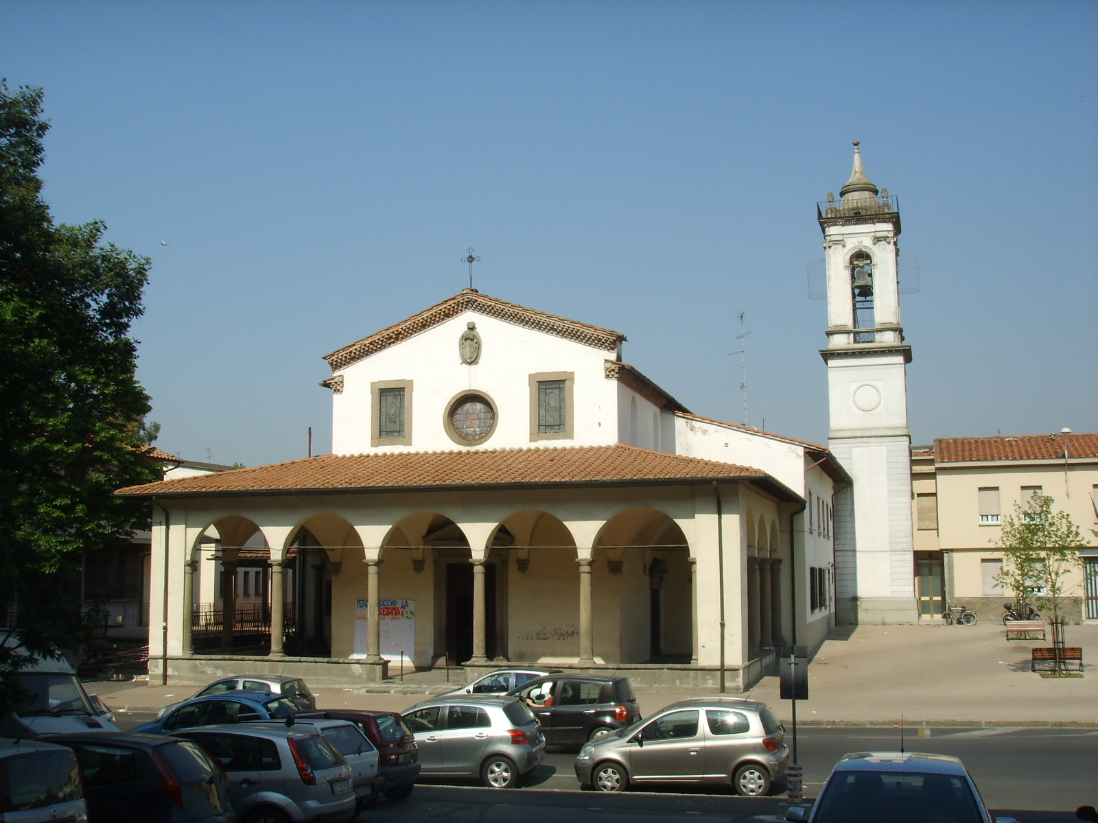 Prato, santa maria del soccorso 02